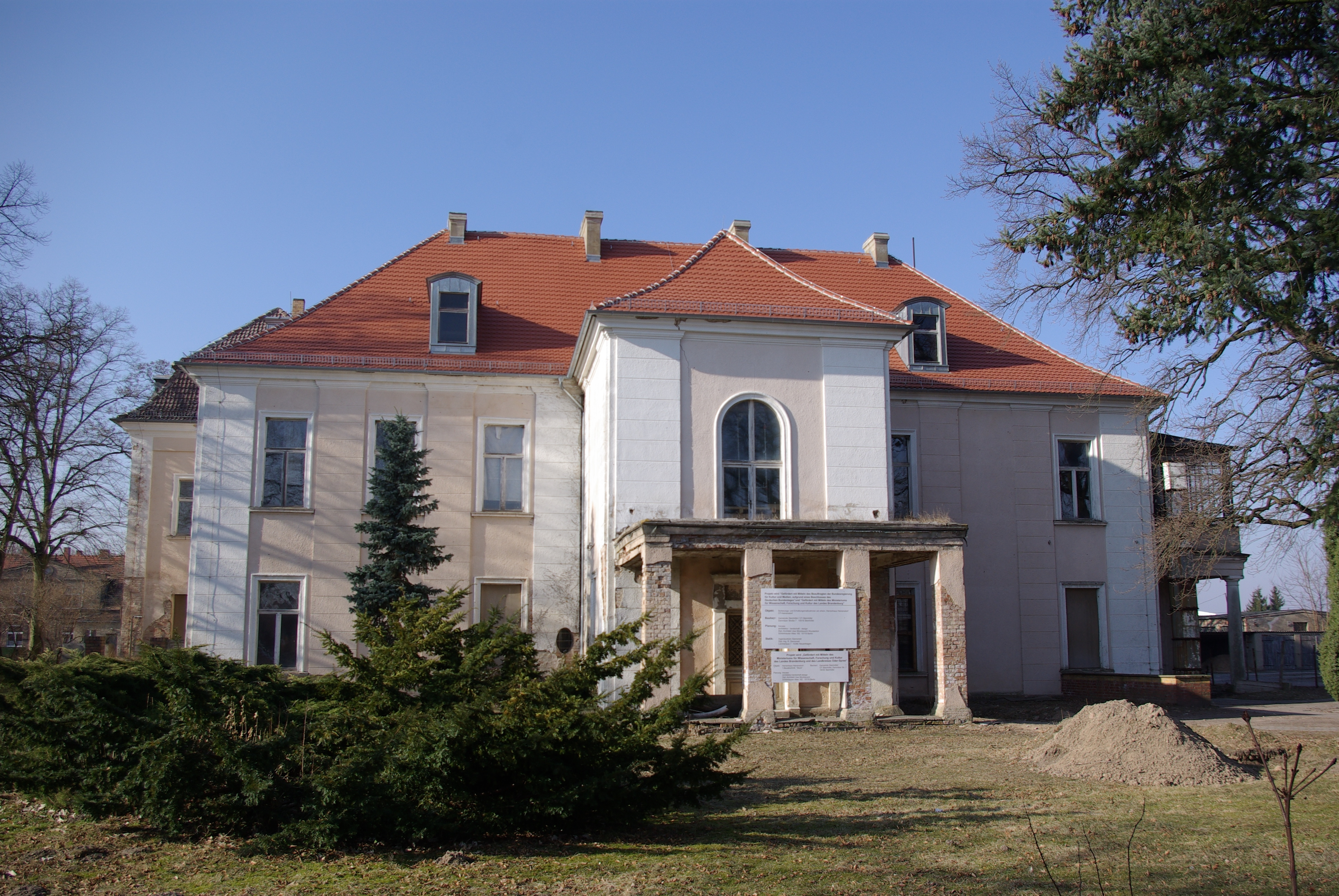 Steinhöfel, Ortsteil Heinersdorf in Brandenburg. Das Gut in Heinersdorf steht unter Denkmalschutz. Das Haus ist baufällig und nicht bewohnt.